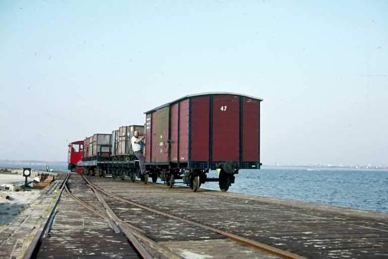 Wangerooger Inselbahn * Quelle: selbst fotografiert 31.8.1983 * Fotograf: Benedikt Dohmen (user: Benedictus), Archiv-Nr. 28/35 * Copyright Status: GNU Freie Dokumentationslizenz